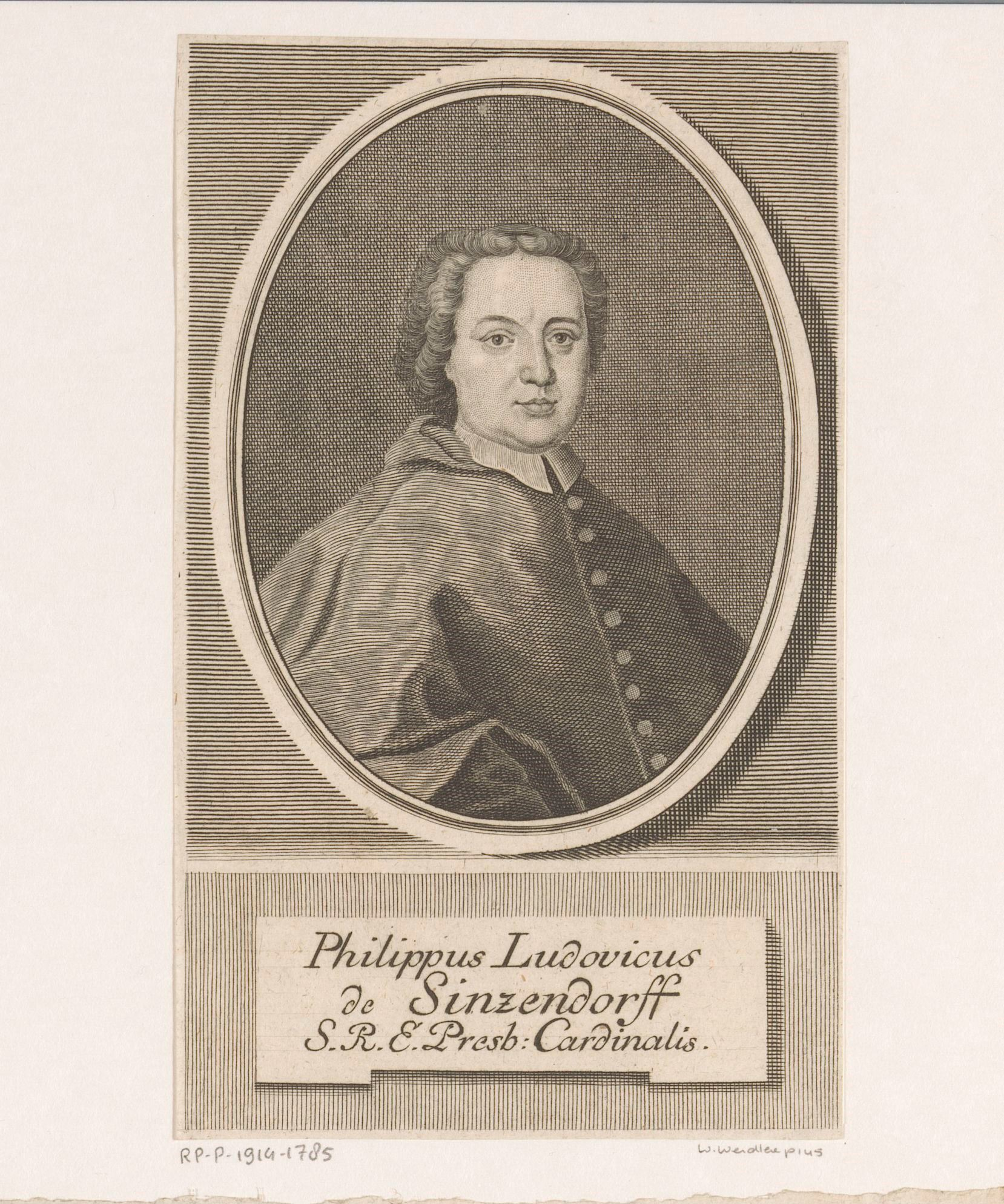 IdentificatieTitel(s): Portret van Philipp Ludwig, Reichsgraf von Sinzendorf, bisschop van BreslauObjecttype: prent Objectnummer: RP-P-1914-1785Catalogusreferentie: HAB A 25561Opschriften / Merken: verzamelaarsmerk, verso, gestempeld: Lugt 2228VervaardigingVervaardiger: prentmaker: Johann Martin BernigerothPlaats vervaardiging: LeipzigDatering: 1740Fysieke kenmerken: gravure met stippelwerkMateriaal: papier Techniek: graveren (drukprocedé) / stippelwerkAfmetingen: blad: h 144 mm (binnen de plaatrand afgesneden) × b 87 mm (binnen de plaatrand afgesneden)ToelichtingPrent ook gebruikt in: Die Neue Europäische Fama, Welche den gegenwärtigen Zustand der vornehmsten Höfe entdecket. dl. 59. Leipzig: Gleditsch, 1740.OnderwerpWat: historical personsWie: Philipp Ludwig Reichsgraf von Sinzendorf (bisschop van Breslau)Verwerving en rechtenVerwerving: aankoop 1905Copyright: Publiek domein